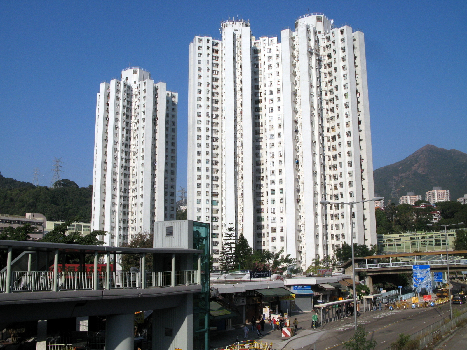 HK Holford Garden